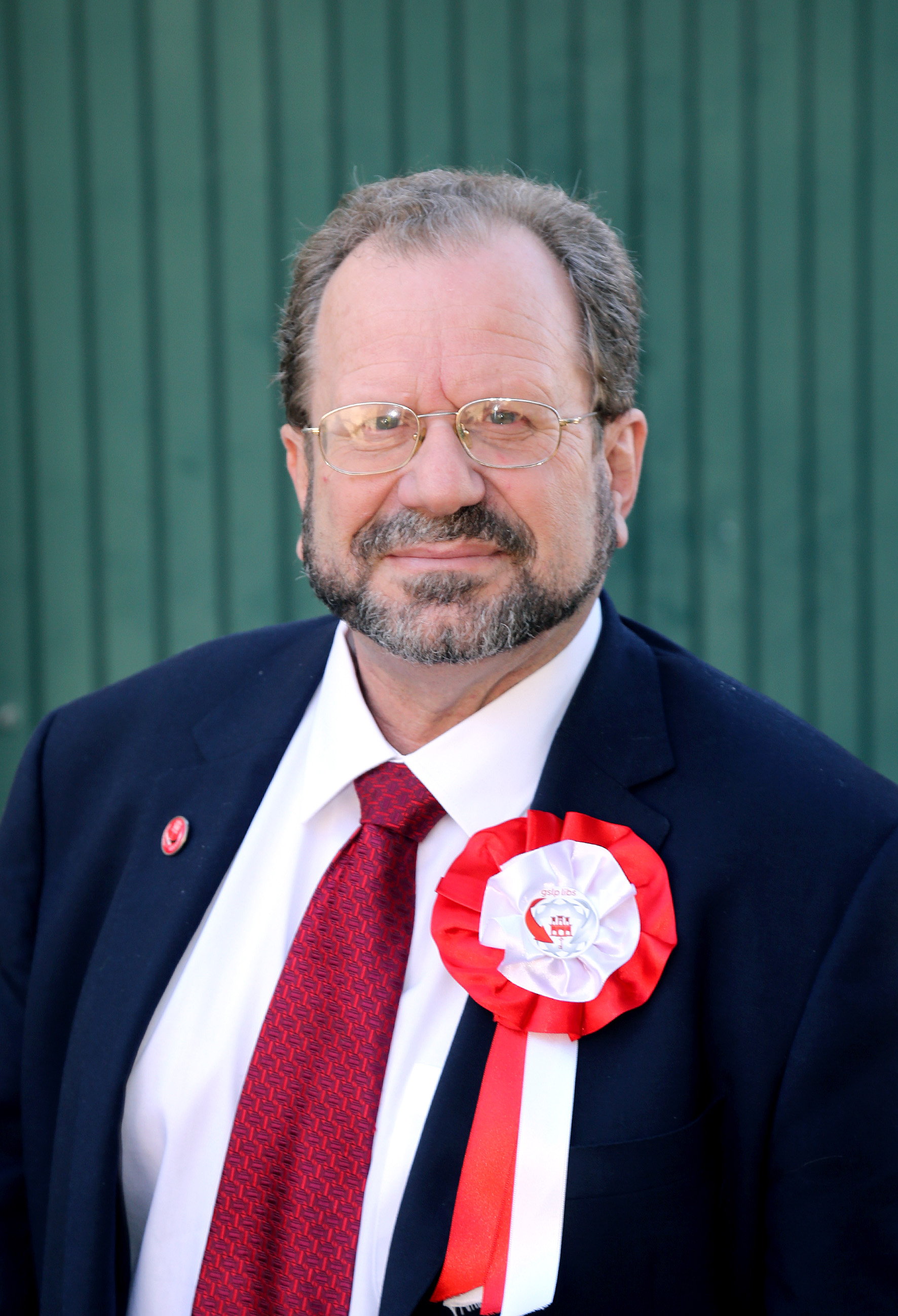 John Cortés GSLP-Liberales